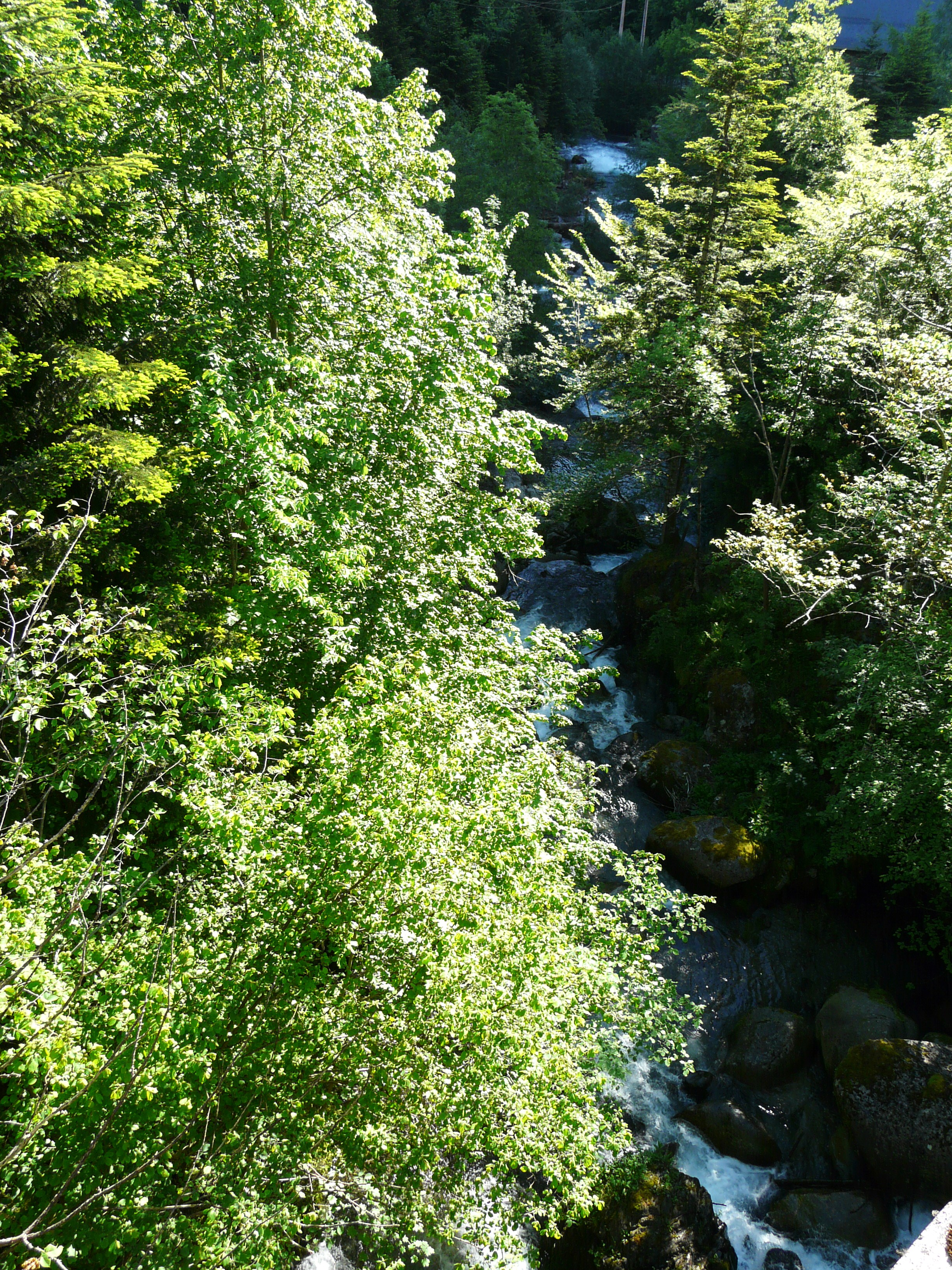 Le Lis en aval du pont de Ravi, Bagnères-de-Luchon, Haute-Garonne, France.